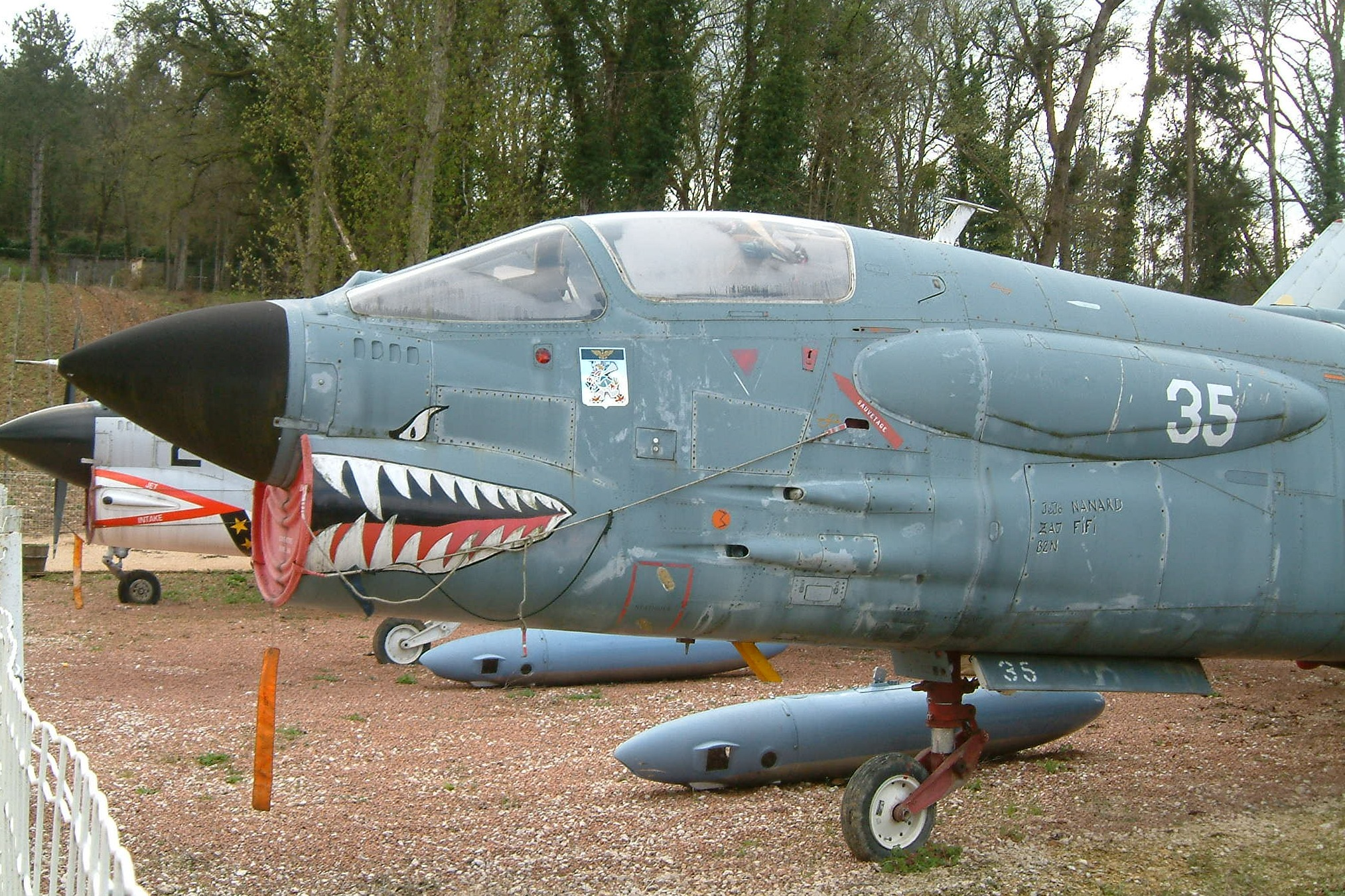 Vought F-8P Crusader conservé au musée du Château de Savigny-lès-Beaune, Bourgogne, FRANCE